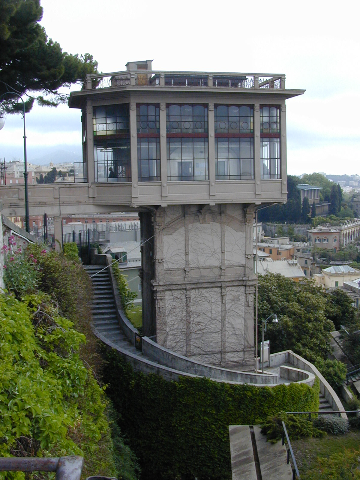 Aufzug zu einem Aussichtspunkt (Belvedere Luigi Montaldo), hier entstand die Fotomontage "Genua Hafen Panorama"